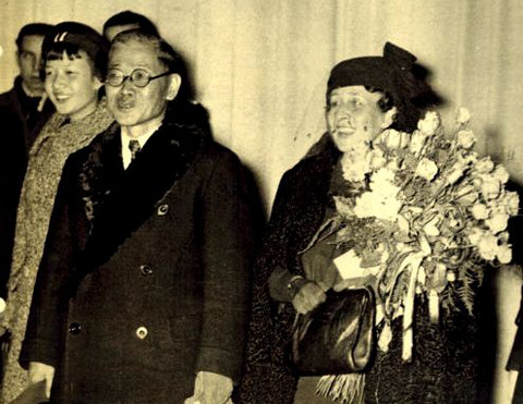 1937年ベルリンに着任する日本国大使 中央が東郷茂徳大使、右にドイツ人妻エディ、左に娘いせ